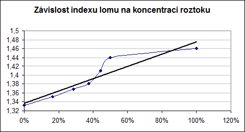 Refraktometria